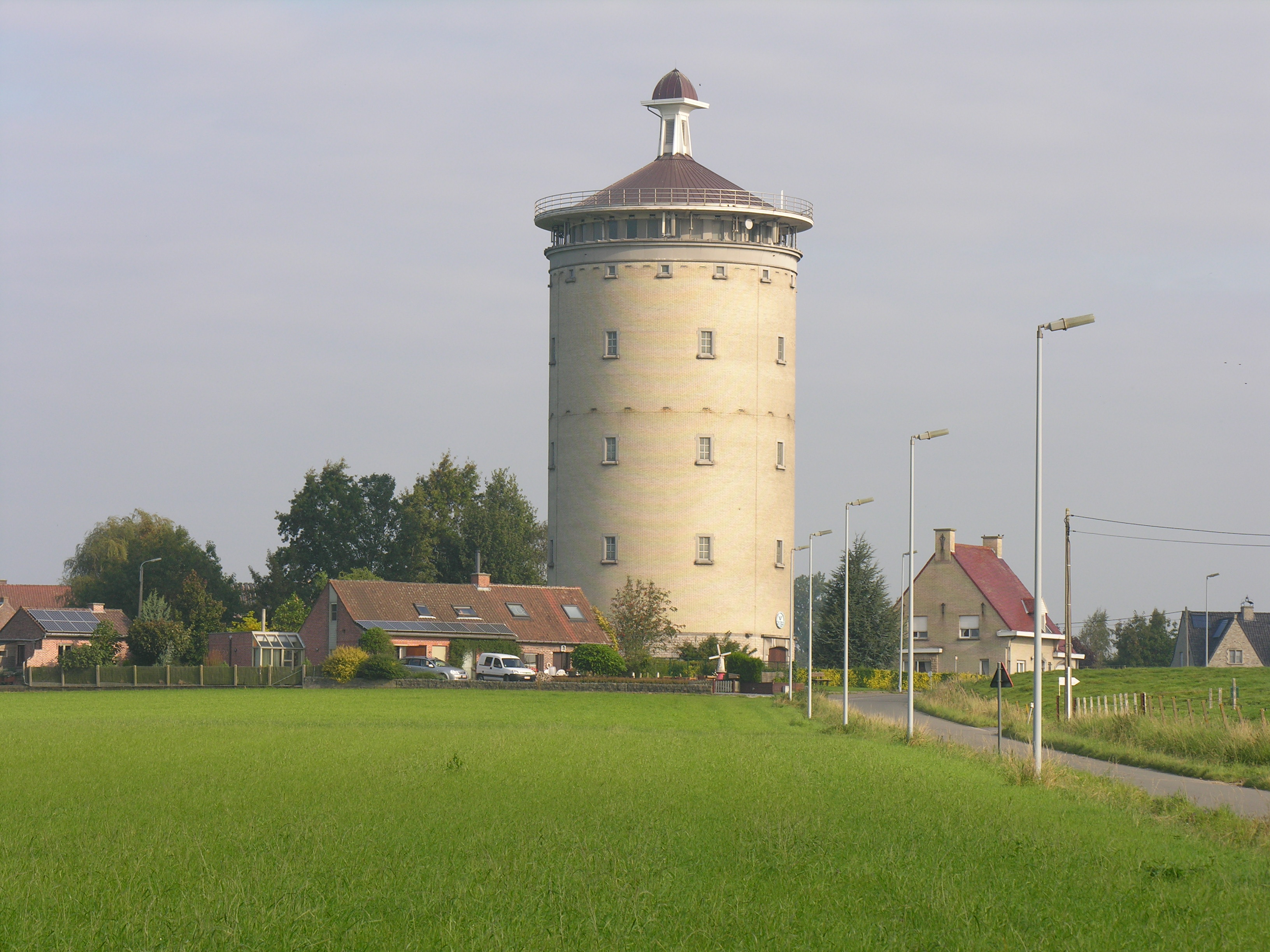 Gullegem, Kwadestraat, watertoren